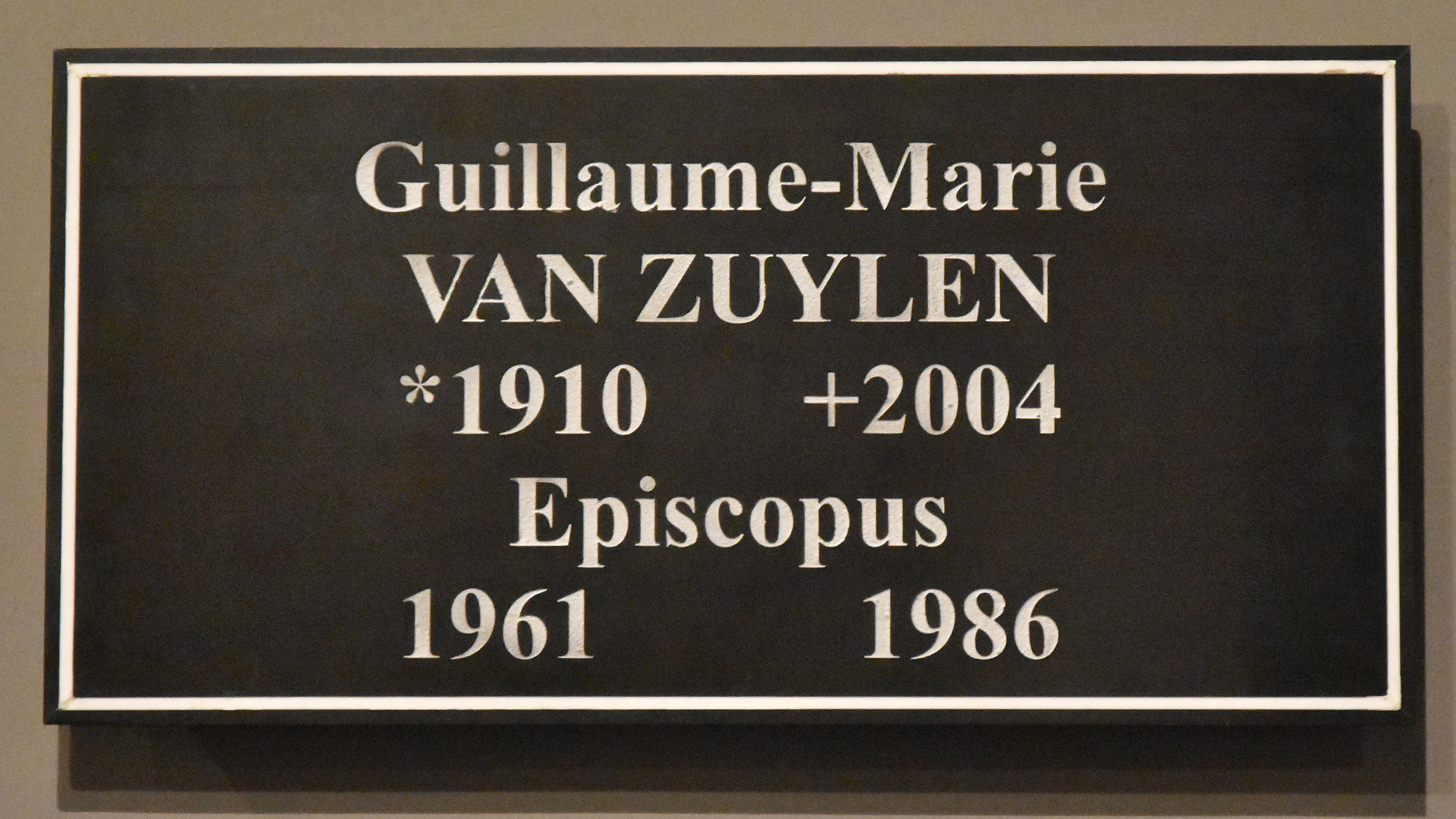 Graf bisschop Guillaume Marie van Zuylen - Sint-Pauluskathedraal (Luik) 23-08-2018